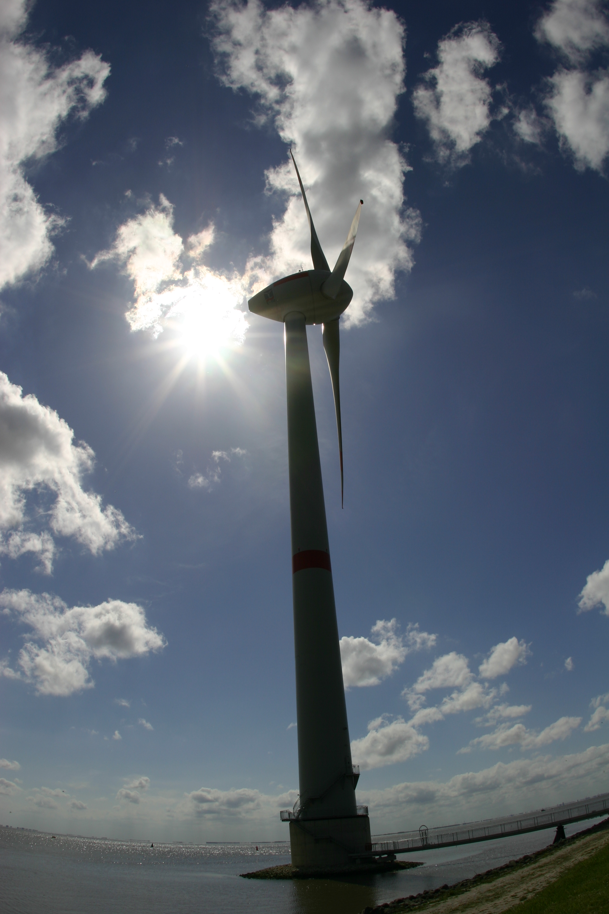 Enercon-Windenergieanlage E 112 an der Ems in Emden, eine der ersten so genannten "Near-Shore-Windenergieanlagen" in Deutschland